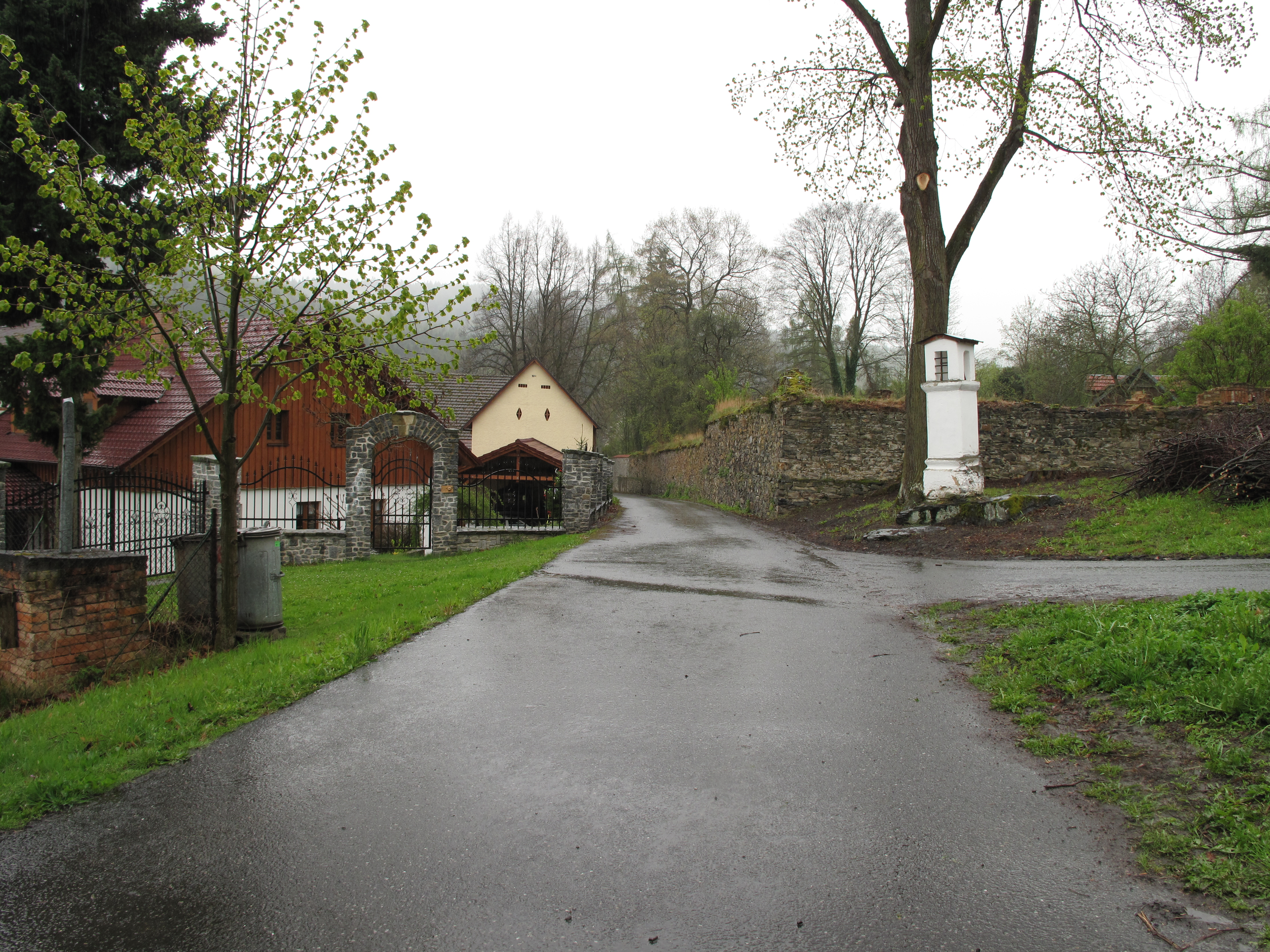 Hořákov. Okres Klatovy, Česká republika.